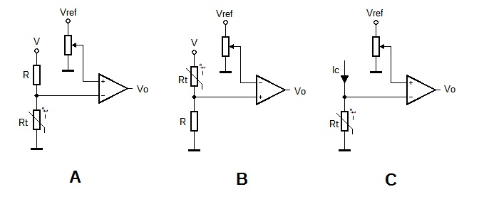 Circuitos detectores de temperatura con AO para un termistor NTC